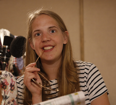 Anna i radiostudion 2016.